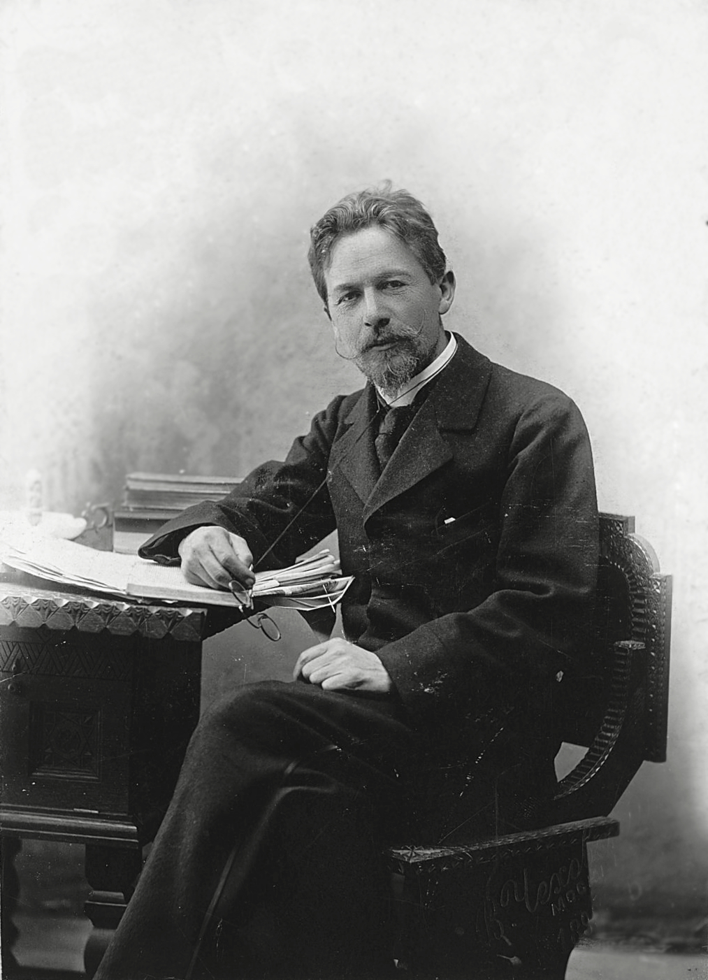 Anton Pavlovich Chekov (1860-1904)